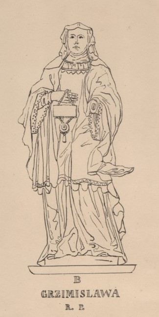 B Grzimisława R. P.